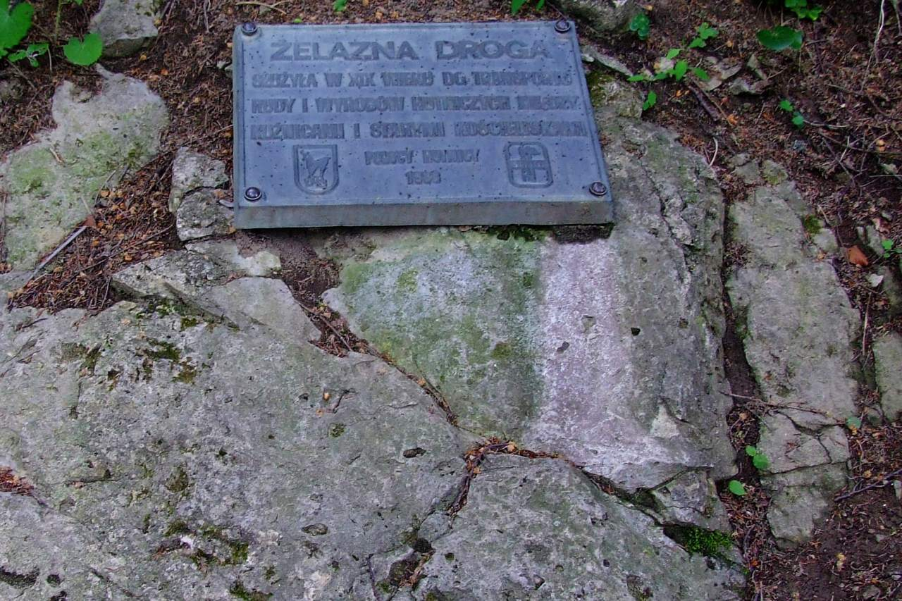 Pamiątkowa tablica przy Drodze pod Reglami